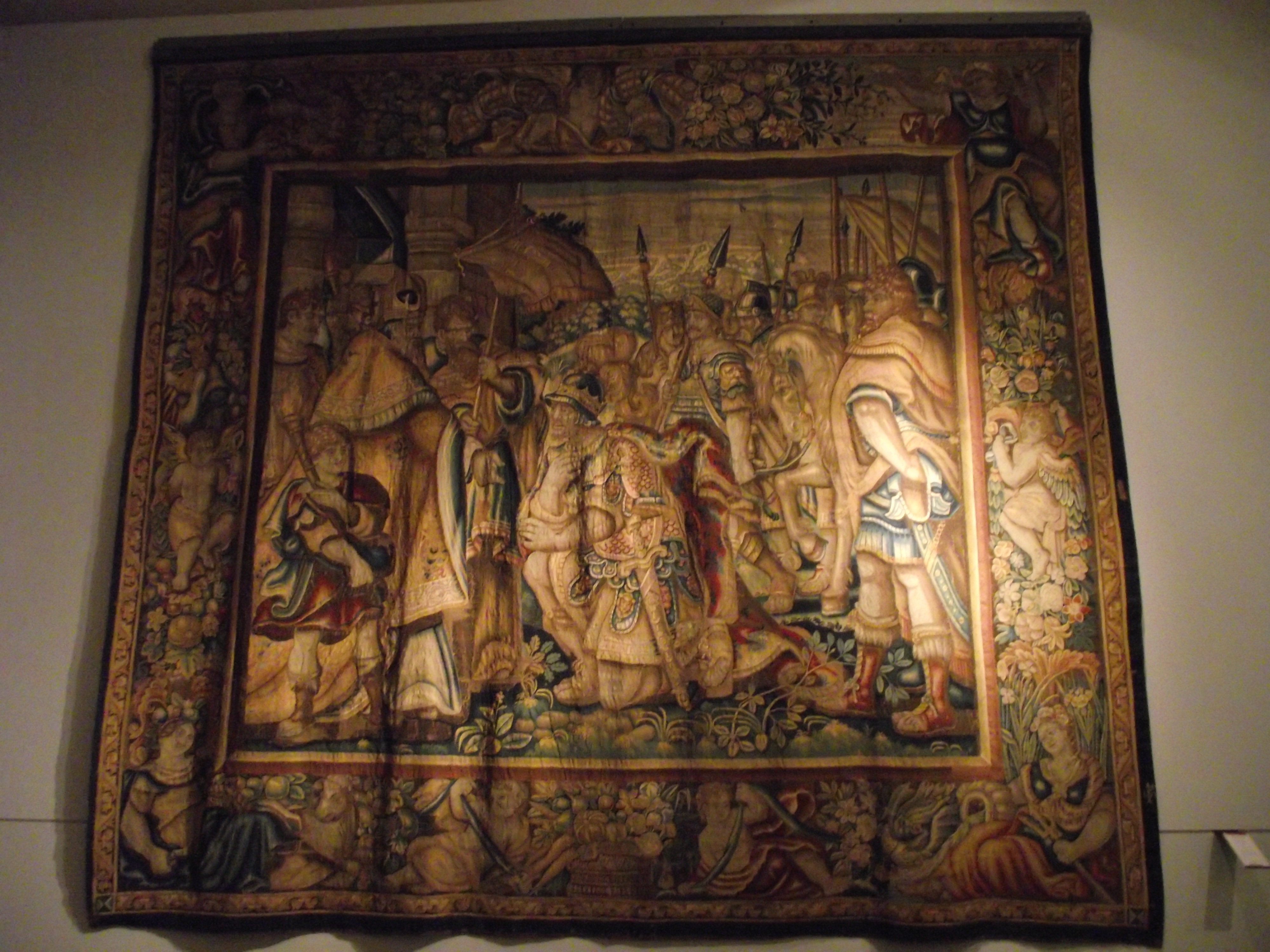 "Alessandro vincitore", Arazzo Fiammingo, XVI secolo